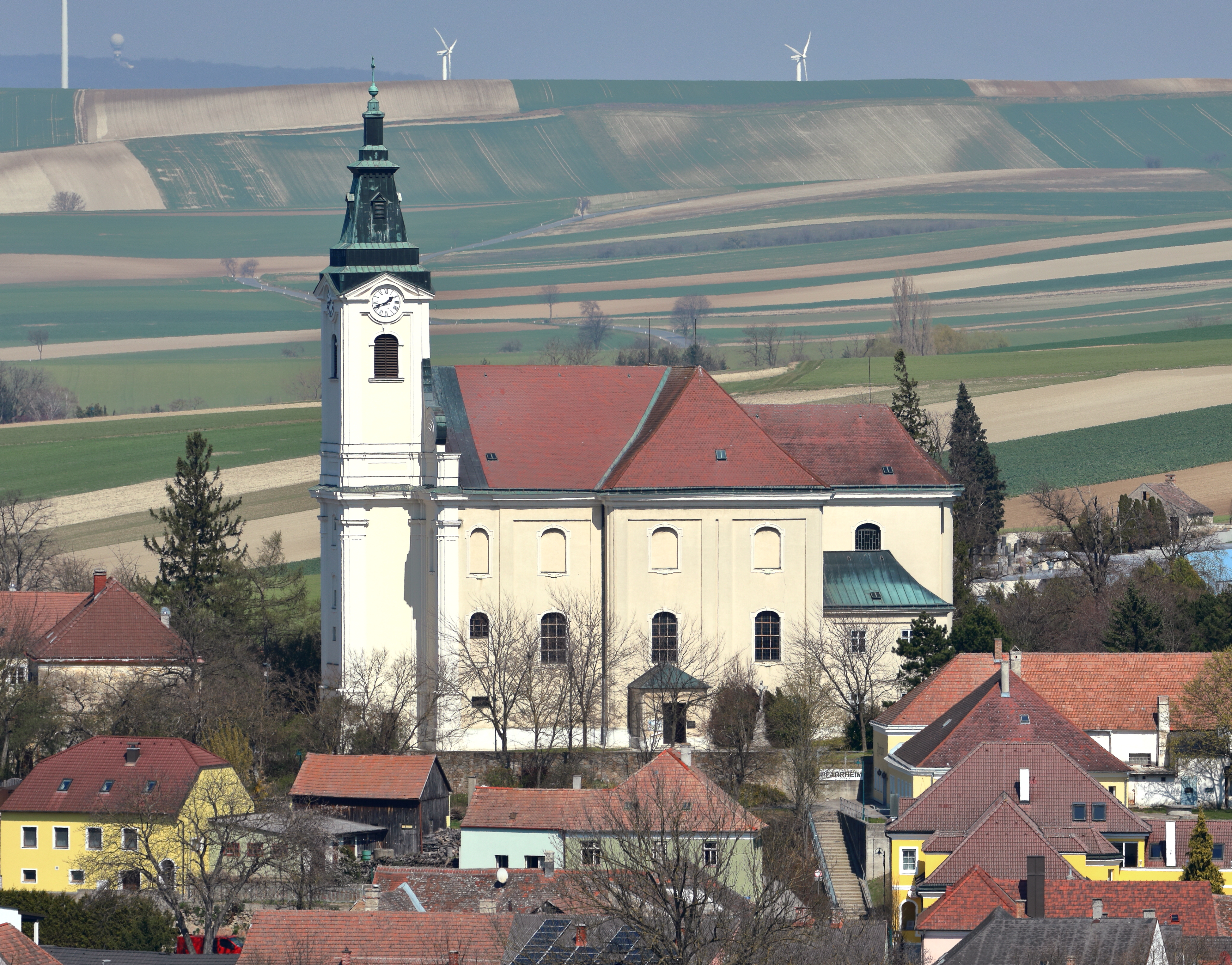 Südwestansicht der röm.-kath. Pfarrkirche hl. Laurentius in der niederösterreichischen Marktgemeinde Niederhollabrunn.